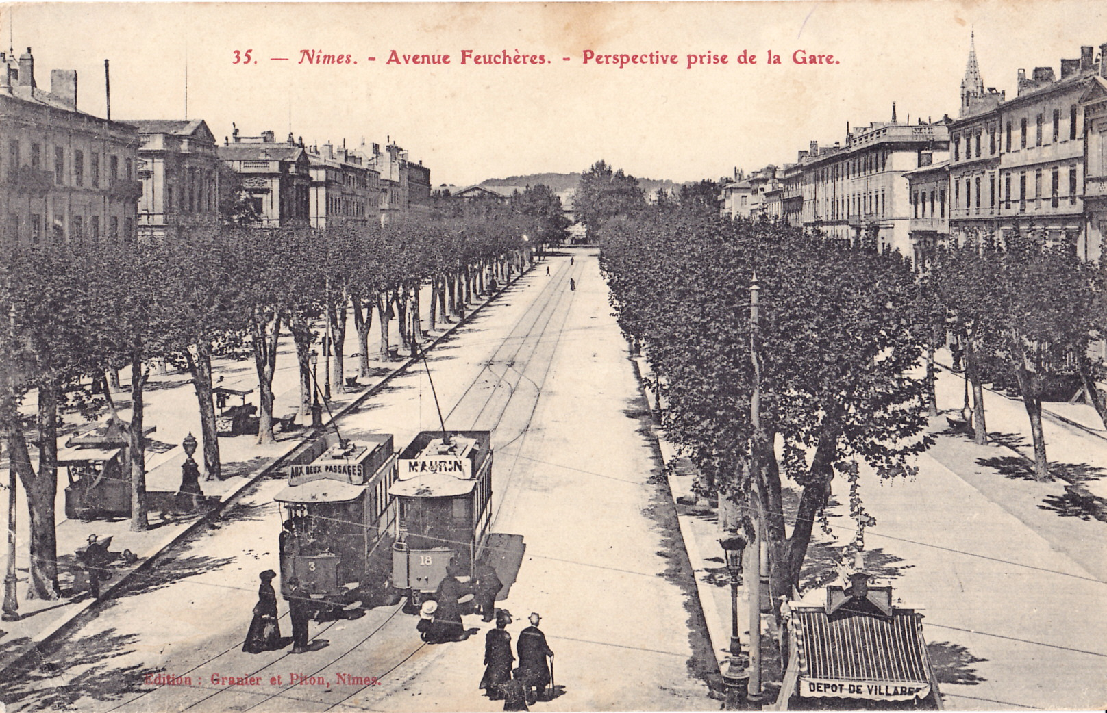 Carte postale ancienne éditée par Granier et Piton à Nîmes :NIMES - Avenue Feuchères - Perspective prise de la Gare